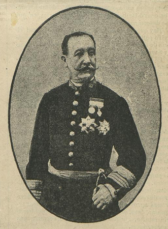 Manuel Macías, general de división y gobernador militar de Melilla, en la revista española La Hormiga de Oro.